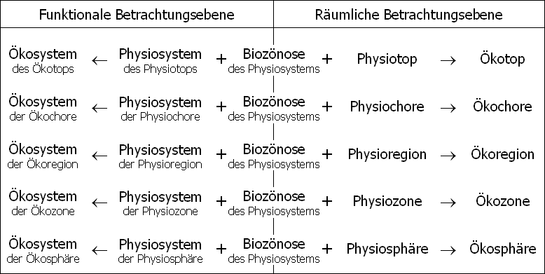 Aufbau von Ökosystemen in funktionaler und räumlicher Betrachtungsebene. Angelehnt an LESER (1997). Um Unterschied zu LESER wird in der hier vorliegenden Darstellung allerdings berücksichtigt, dass die Biozönose sowohl räumlichen als auch funktionalen Charakter besitzt. Denn Lebewesen befinden sich einerseits an einer bestimmten Stelle im Raum (und bewegen sich darin) und fungieren andererseits gleichzeitig als interagierende Systemeinheiten. LESER andererseits unterteilt den Charakter von Lebewesen künstlich.Für die räumliche Betrachtungsebene sieht er ausschließlich ihre räumliche Komponente. Diese nennt er 'Biotop' (Phytotop und Zootop) und meint damit ihren Aufenthaltsort (Wuchsort, Fundort) im Raum.Für die funktionale Betrachtungsebene sieht er ausschließlich ihre funktionale Komponente. Diese nennt er 'Biosystem' (Phytozönose und Zoozonose) und meint damit ihre Wechselwirkungen untereinander. Leser H: Landschaftsökologie. Stuttgart, 1997: 163-165 ISBN 3-8252-0521-5